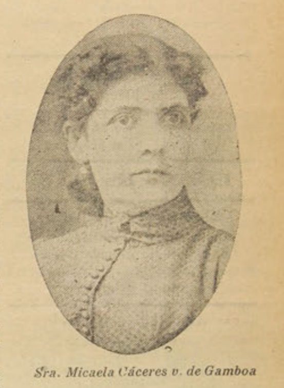 Sra. Micaela Cáceres viuda de Gamboa fue la fundadora de la Sociedad de Obreras de Socorros Mutuos de Valparaíso en el año 1887 Esta imagen pertenece al periódico Unión Femenina de Chile publicado el 10 de enero de 1934